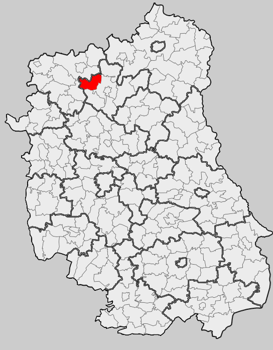 Map of gmina Ulan-Majorat, Radzyń Podlaski county, Lublin voivodship Mapa gminy Ulan-Majorat, powiat radzyński, województwo lubelskie